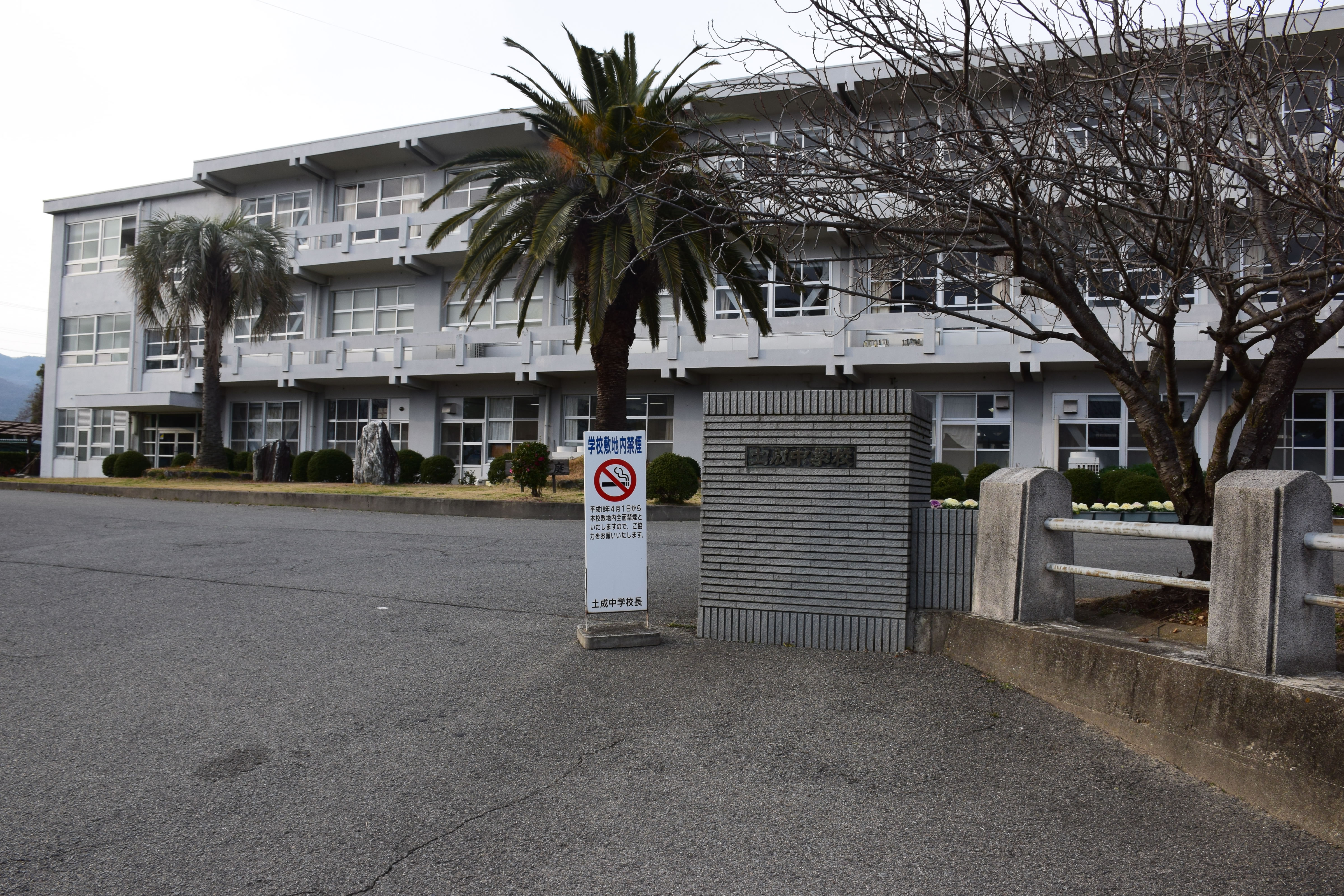 阿波市立土成中学校